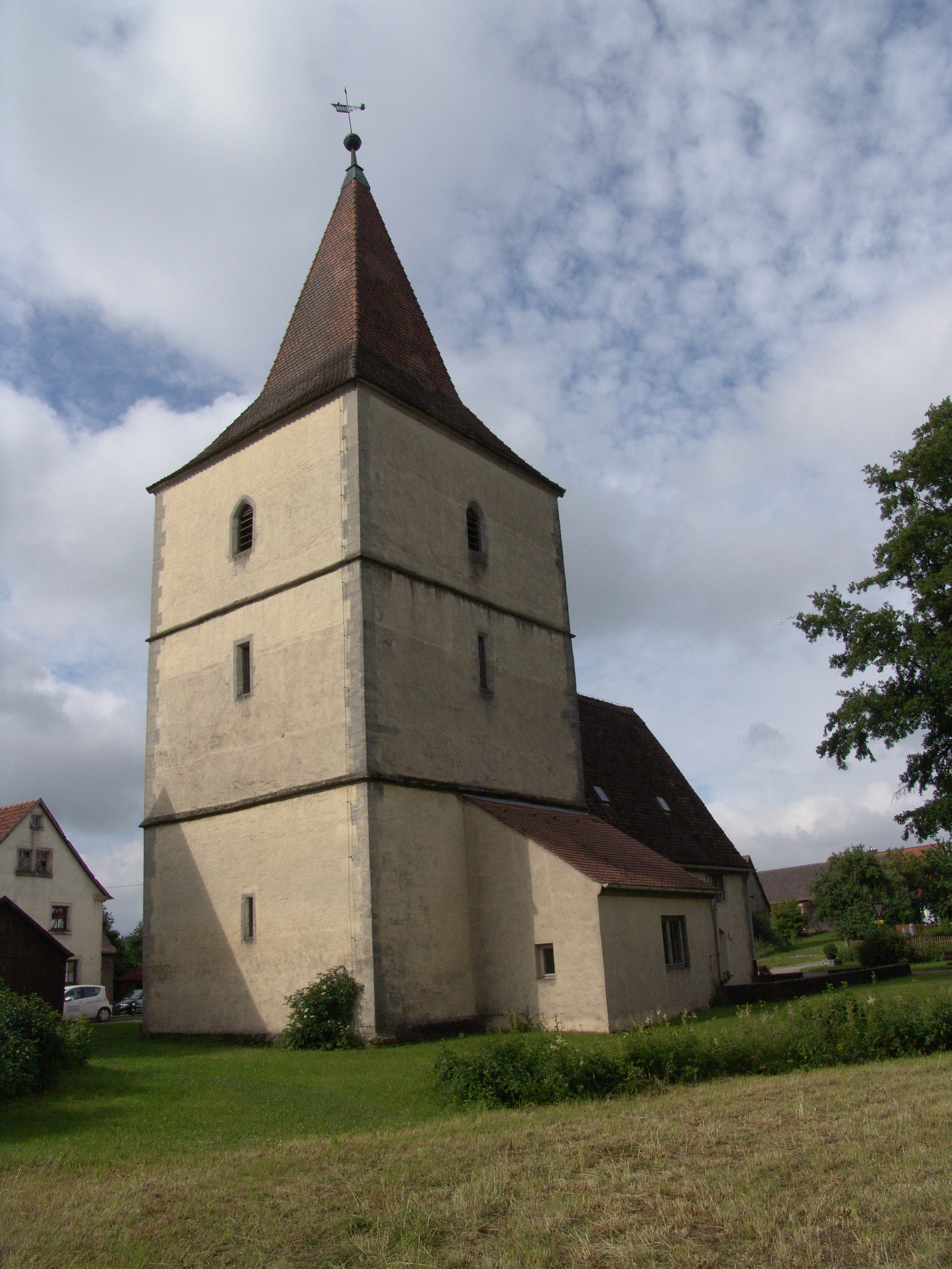 evang.-luth. Kirche Zu unserer lieben Frau in Hagenau